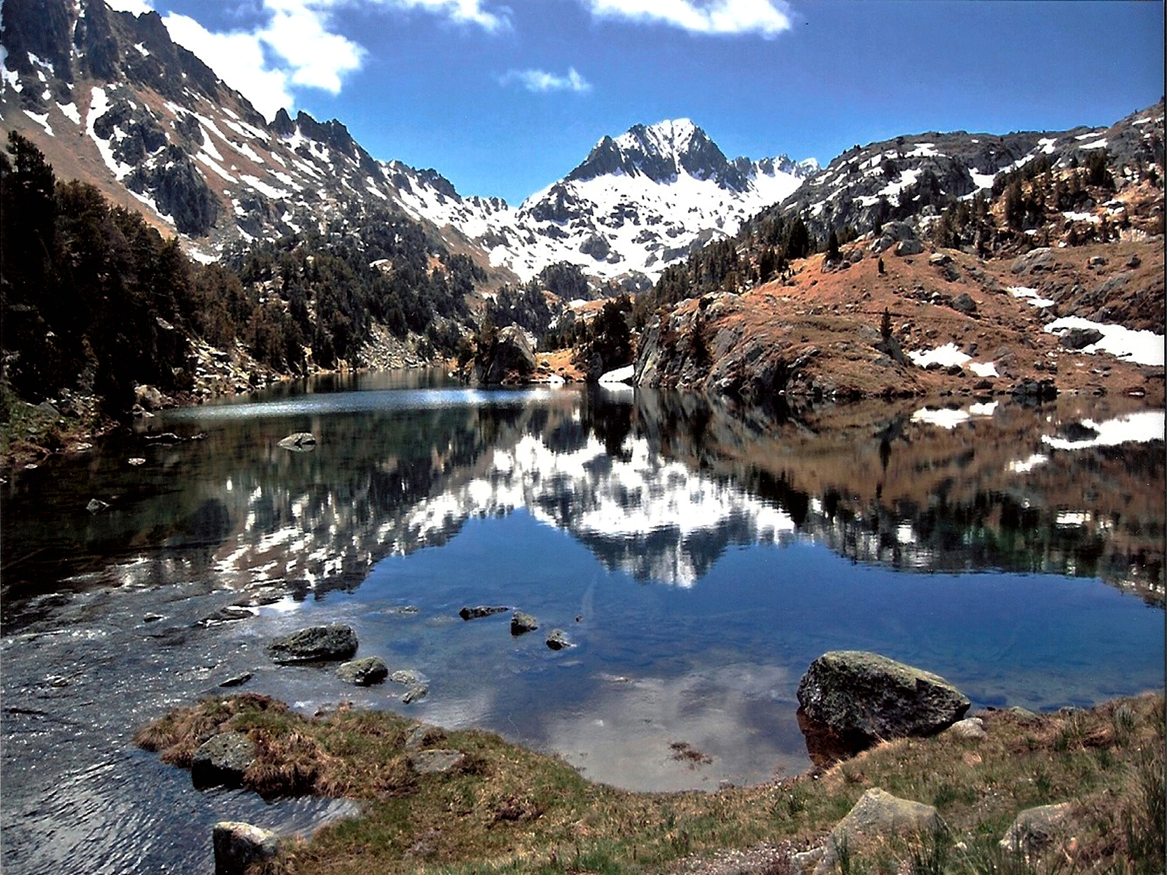 Estany Llong de Colomers al terme municipal de Naut Aran This is a a photo of a wetland in Catalonia, Spain, with id: IZHC-99999999